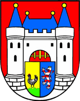 Wappen der Stadt Schmalkalden